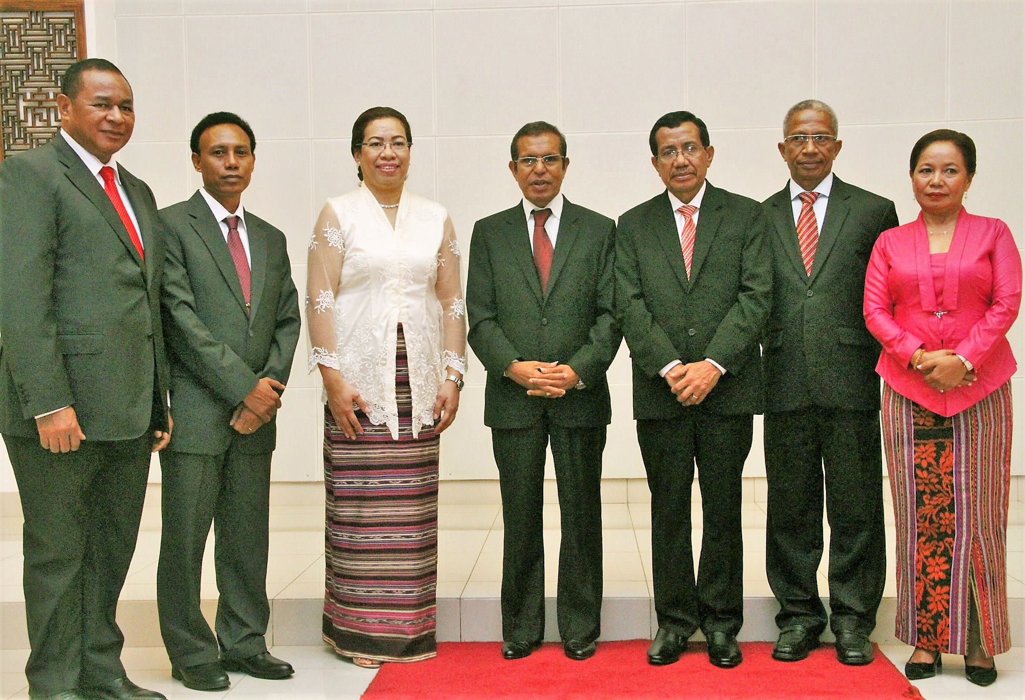 Die neuen osttimoresischen Botschafter, nachdem sie ihre Akkreditierung von Präsident Taur Matan Ruak erhalten haben